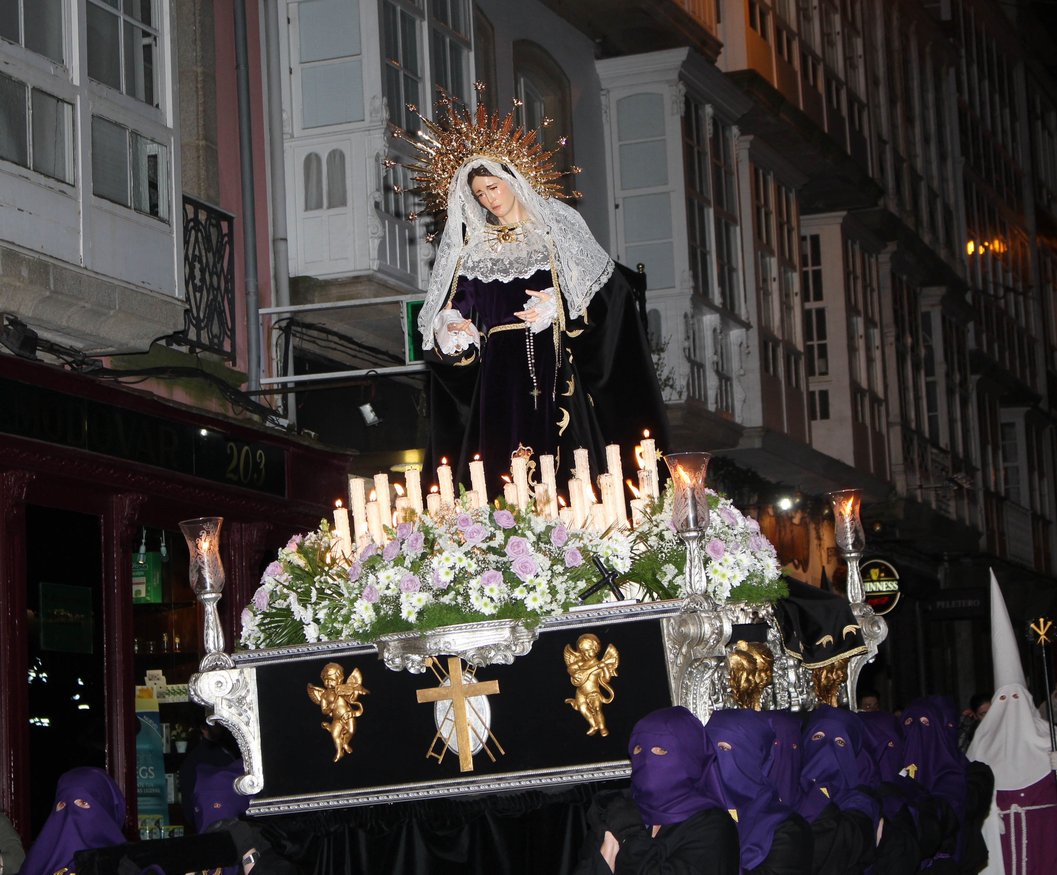 Virgen del Perdón y la Misericordia en la Semana Santa 2018